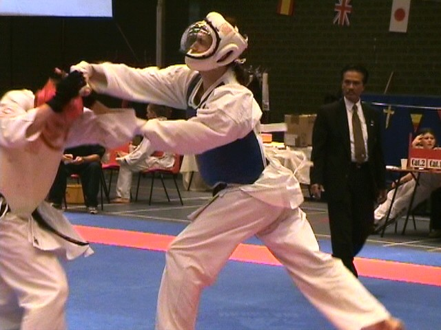 Eigen gemaakte foto ten tijde van Amsterdam Open International Karatedo Championship 2004. Meer info op